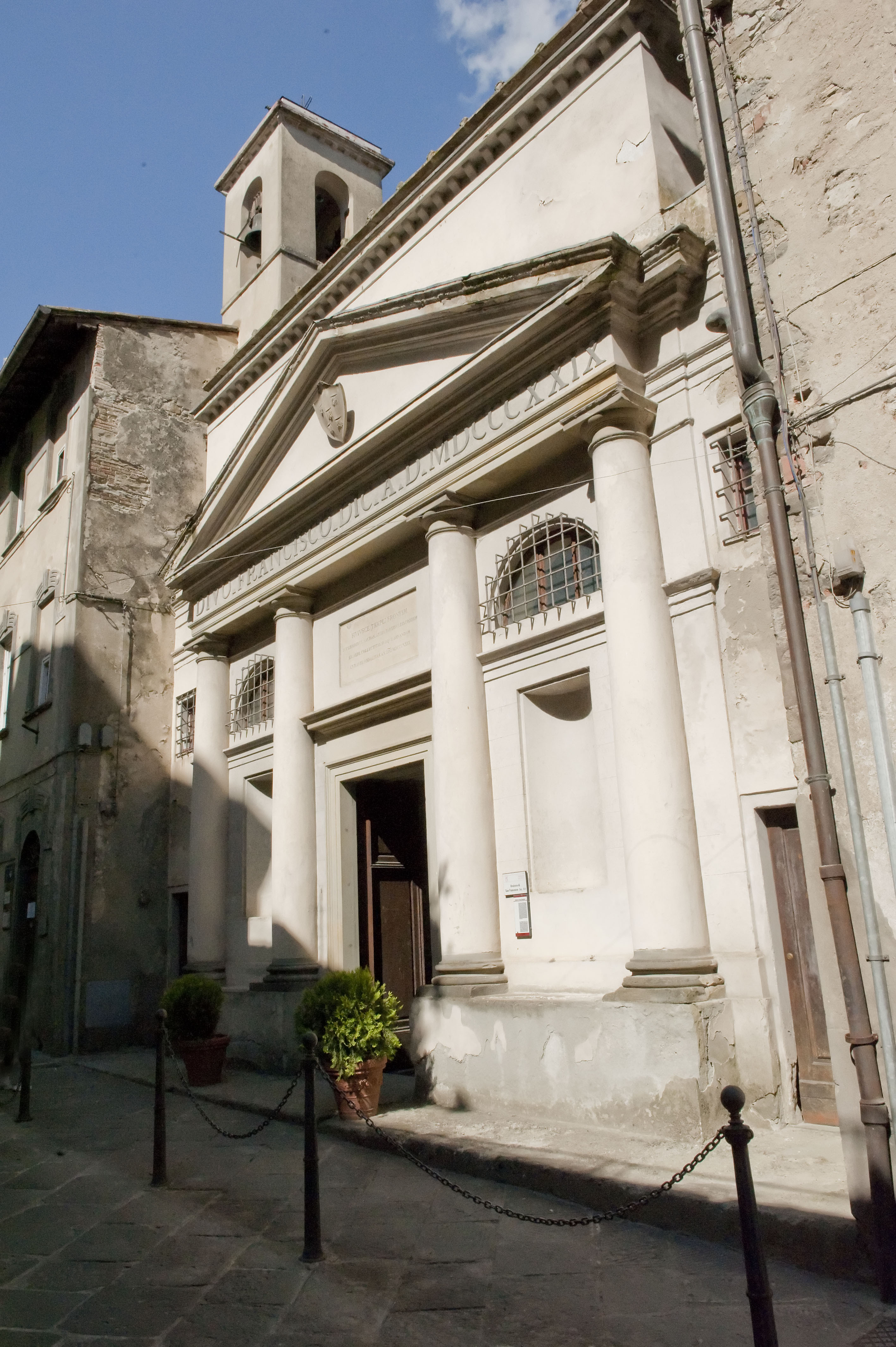 Oratorio di San francesco - Bibbiena- Arezzo